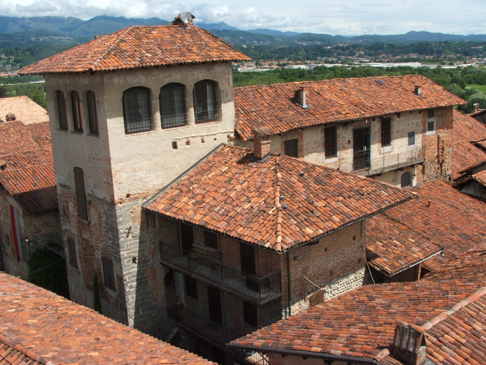 Ricetto di Candelo, provincia di Biella, Piemonte, Italia